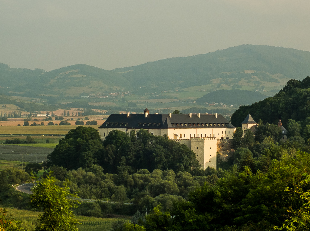 po dokončený rekonštrukcie